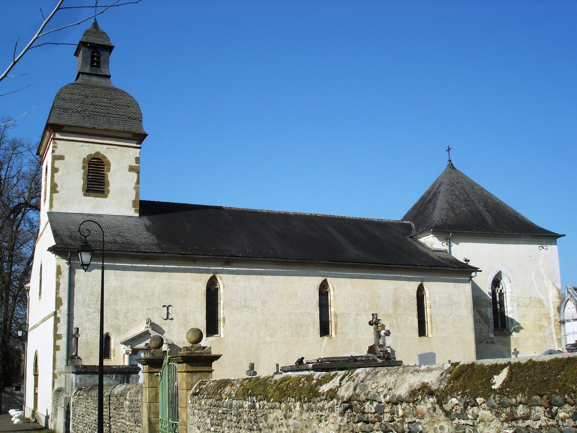 Eglise de Labatut-Rivière, Hautes-Pyrénées, France